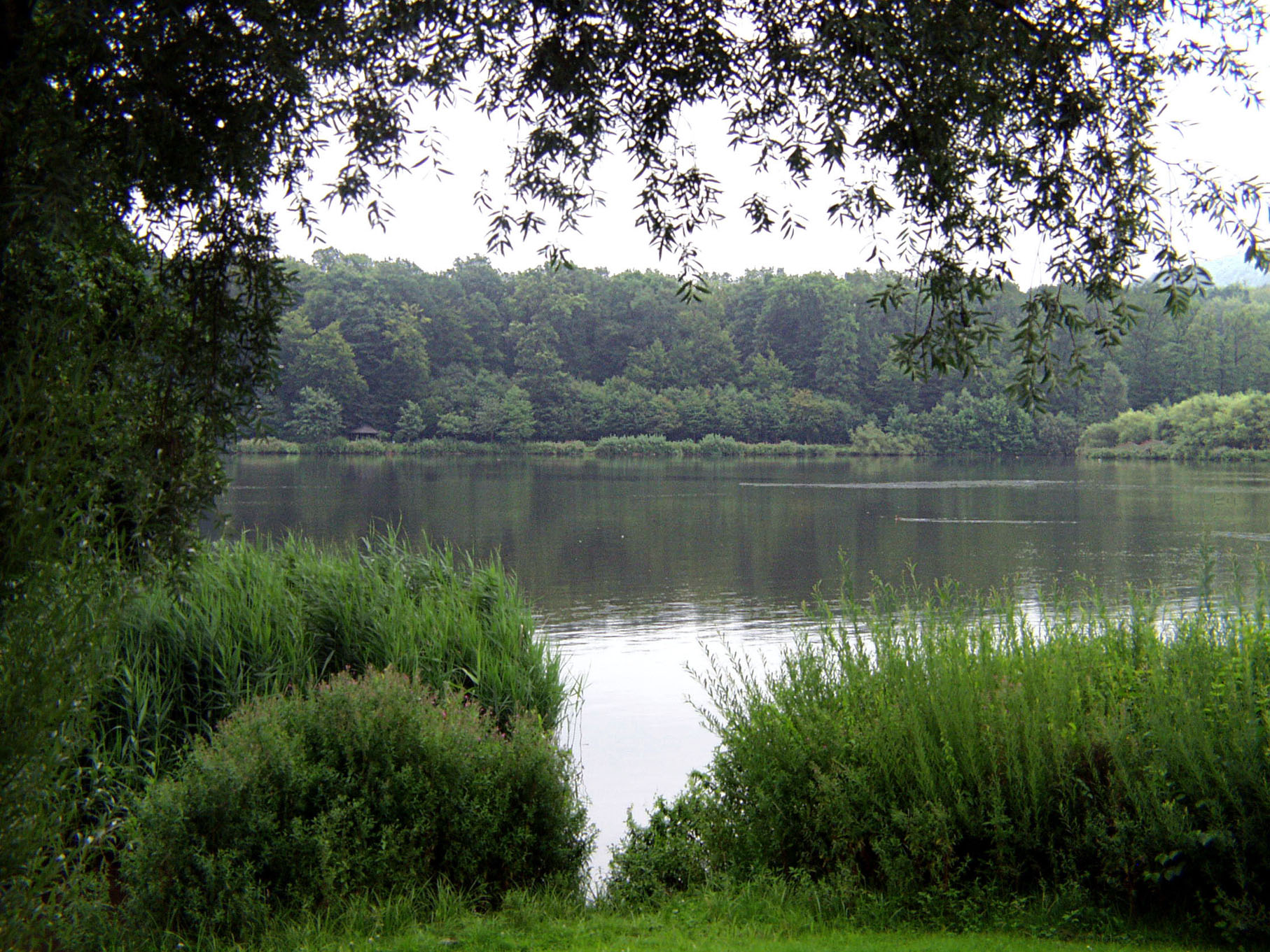 Emmerstausee, Schieder-Schwalenberg, Nordrhein-Westfalen, Deutschland. – Bei Schieder führt der Emmerweg am Ufer des Emmerstausees und dem anliegenden Ortsteil Glashütte entlang.